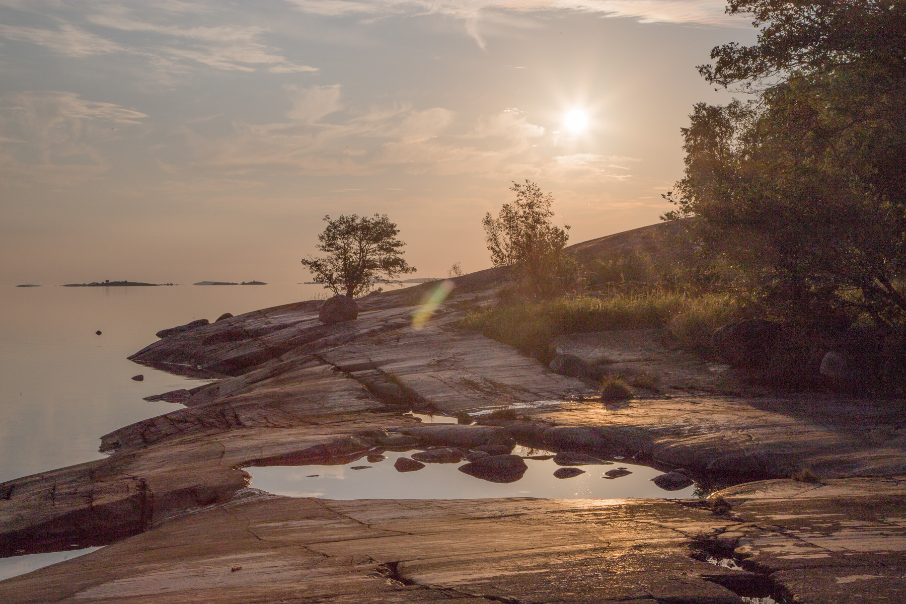 Soluppgång från västra udden på Älveskär